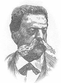 Descrizione: ritratto di Francesco Cirio (1836-1900). Autore: sconosciuto. Fonte: → articolo de "Il Ponte". Licenza: probabilmente opera di pubblico dominio perché realizzata prima del 1900. Note: autorizzazione concessa da Simone Giuliano, direttore de "Il Ponte". OTRS #2006060710009126